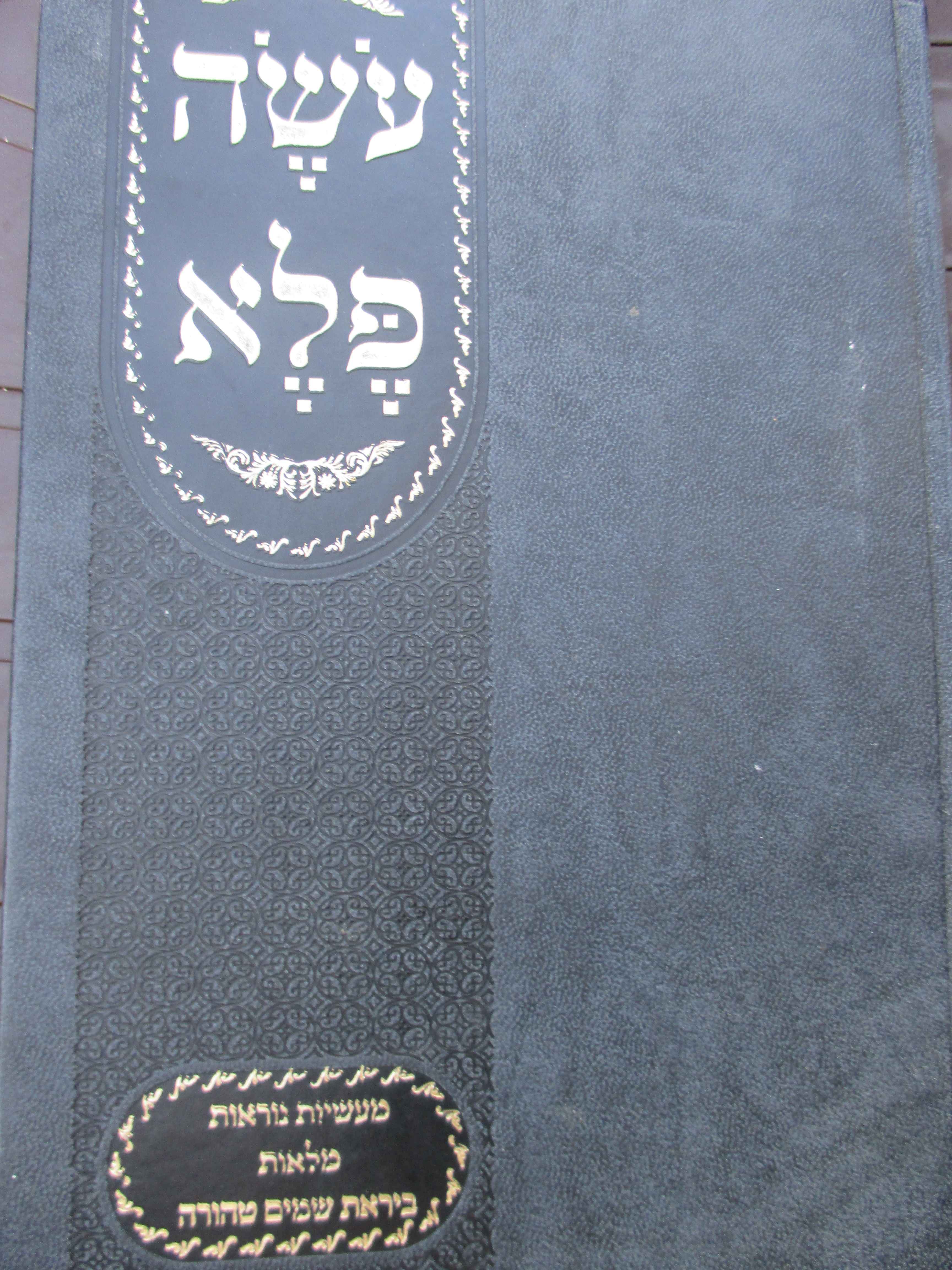 שער הספר עושה פלא במהדורה חדשה